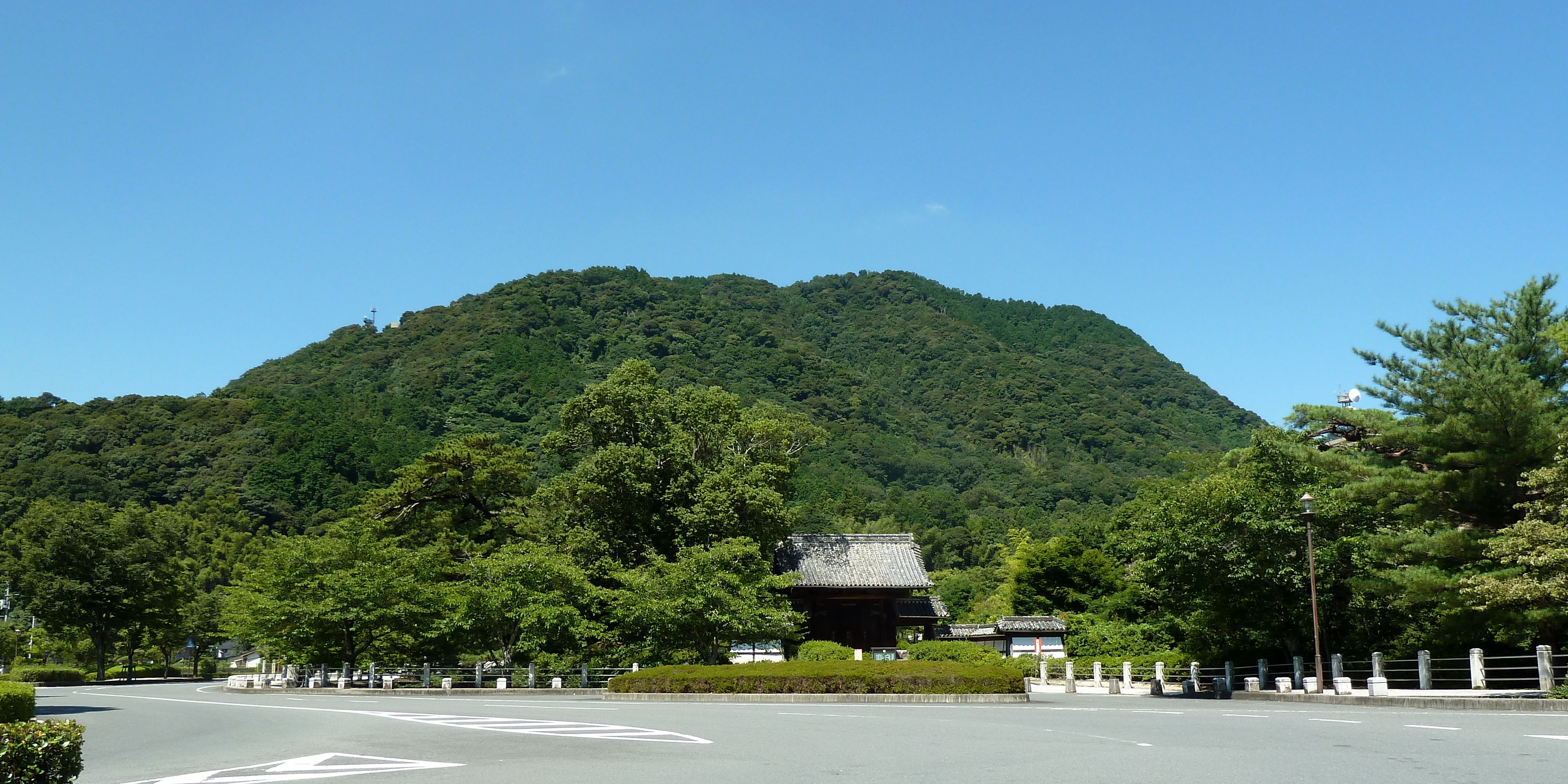 鴻峰城跡 風景